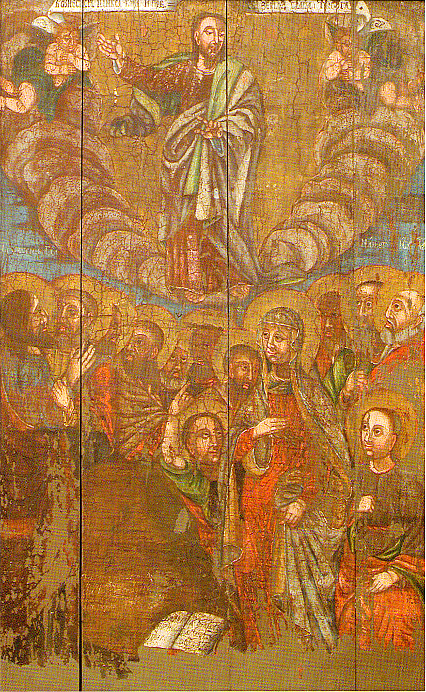 Мастацкая галерэя Нацыянальнага полацкага гісторыка-культурнага музея-запаведніка. Абраз «Узнясенне Ісуса Хрыста», Дошка, алей. 143х89х3. Мясцовая школа (з в. Экімань Полацкага раёна). У правым ніжнім вуглу надпіс, які сведчыць пра месца прызначэння і час выканання абраза:«Ten obraz Wniebostapienia Panskiego S.r. ... do cerkwi Ekimanskiej ... 1743». Рэстаўрацыя - У. Ракіцкі (2001)